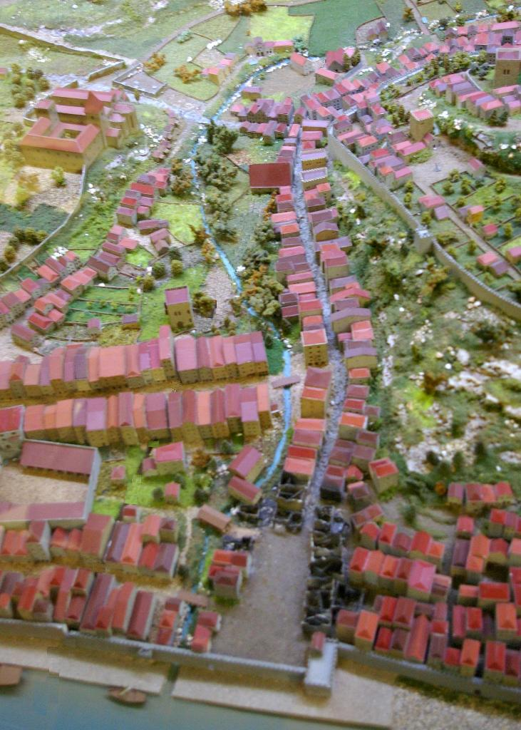 "Casa do Infante" museum in Porto, Portugal